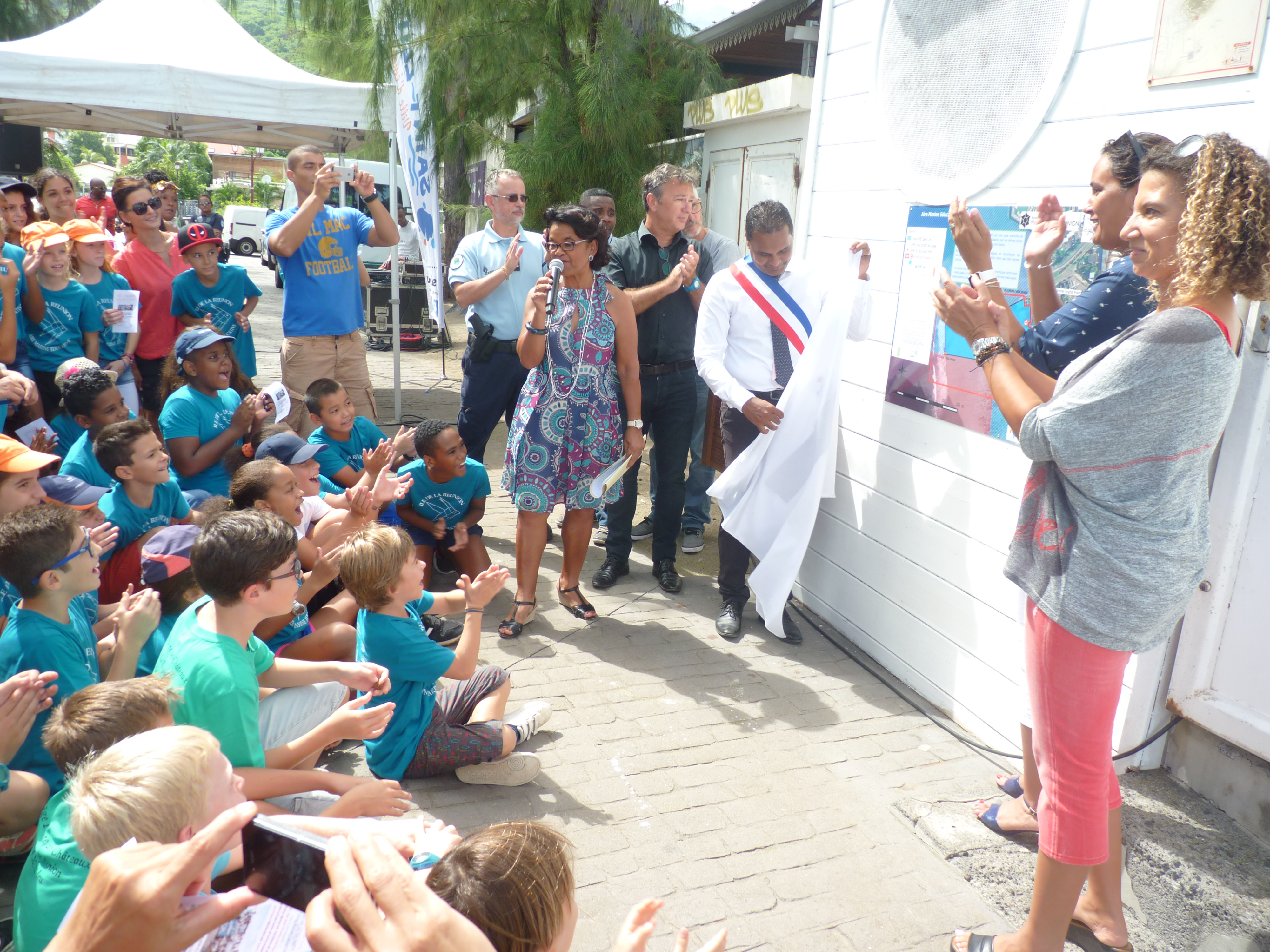 Les élus de Saint-Leu se déplacent pour inaugurer le panneau d'information conçu par les élèves de l'Aire marine éducative.